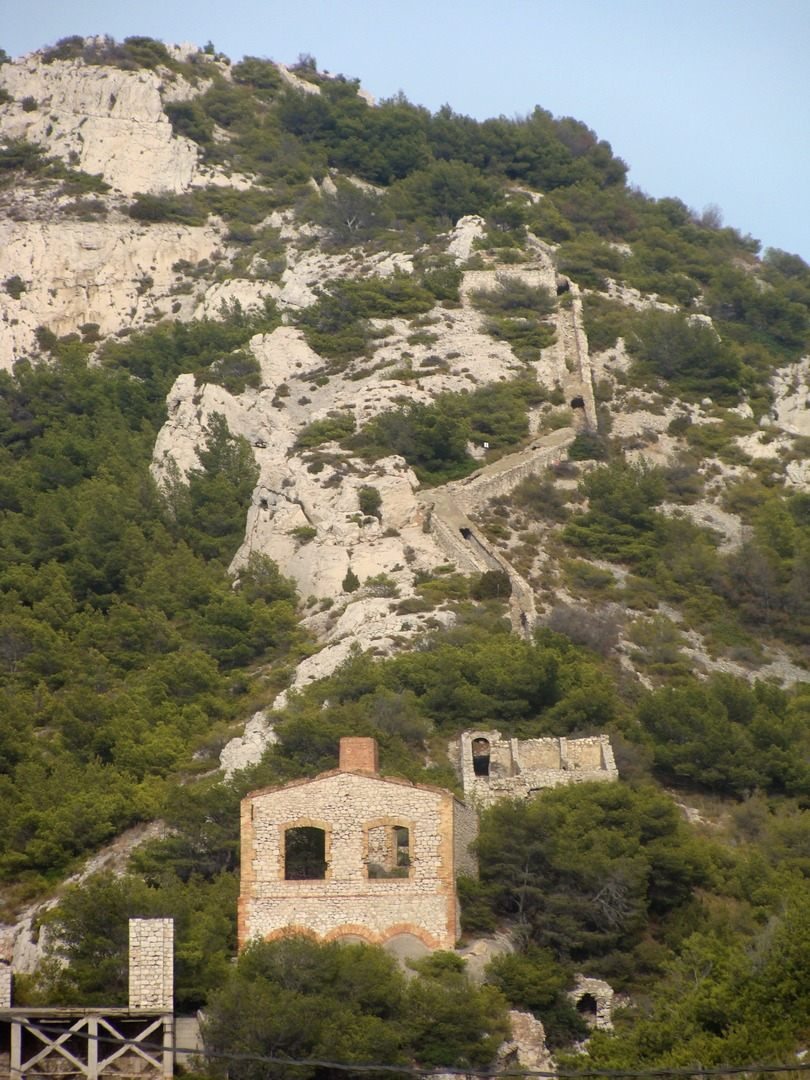 L'ancienne usine de l'Escalette, sur la route des Goudes, avec sa "cheminée" rampant sur la colline au-dessus d'un sas de désenfumage.